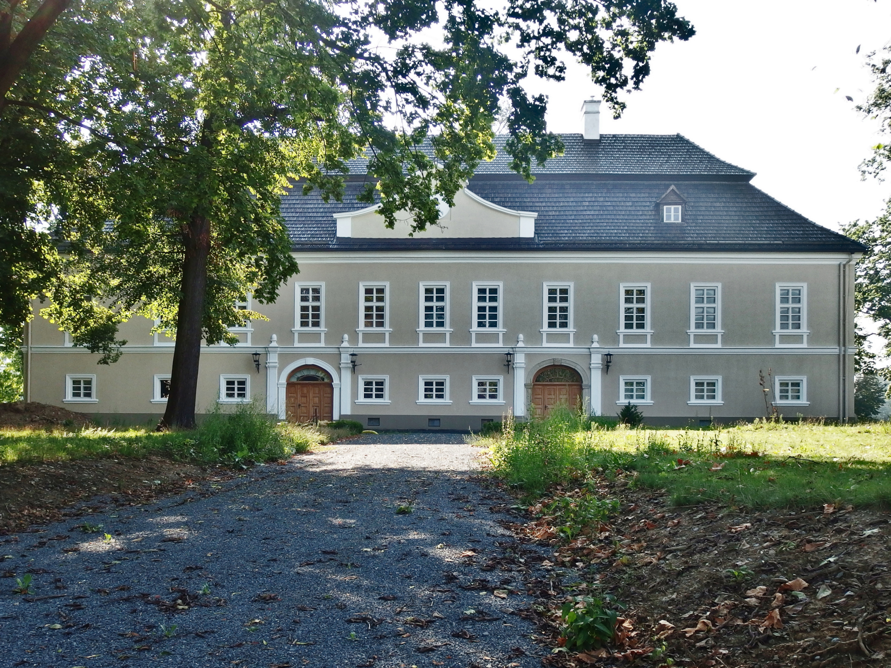 Zámek Jeseník nad Odrou, Jeseník nad Odrou 1, Jeseník nad Odrou.